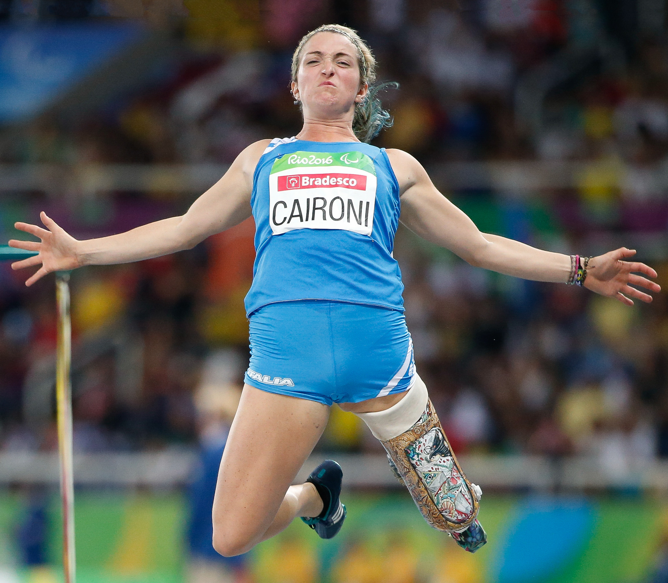 Rio de Janeiro - Italiana Martina Caironi leva prata no salto em distancia T42 do atletismo nos Jogos Paralímpicos Rio 2016, no Estádio Olímpico.